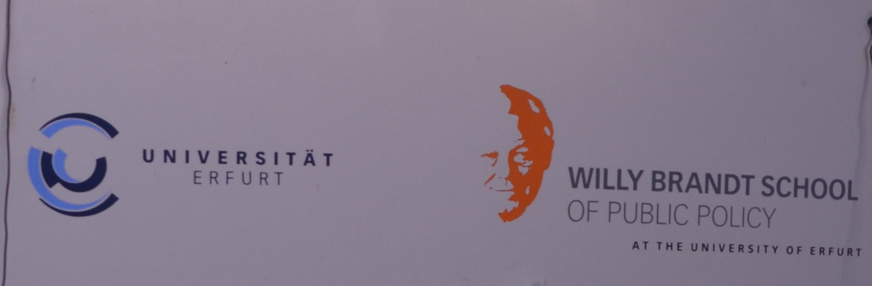 Hinweis Schild der WBS Erfurt